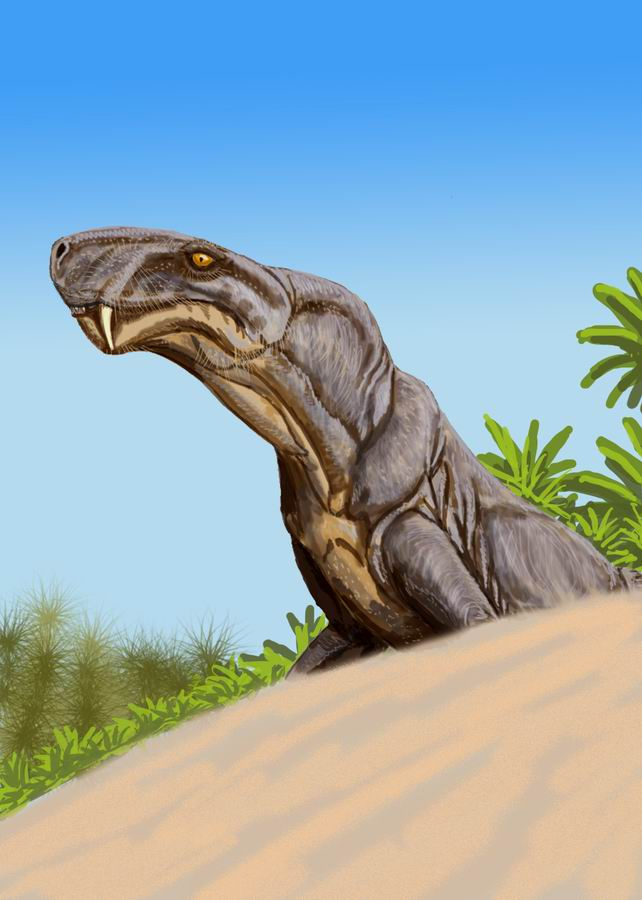 Арктопс Ватсона